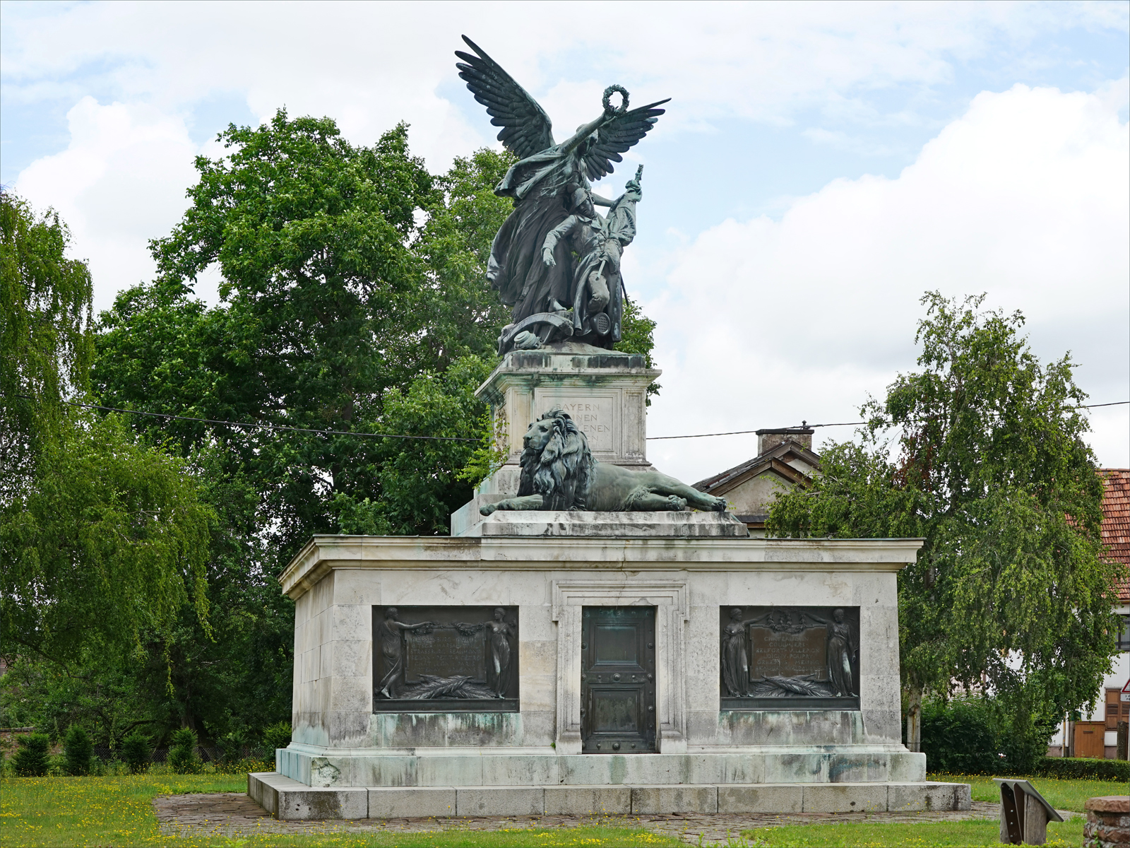 Monument dédié aux Bavarois à Woerth en Alsace. Il s'agit également d'une sépulture où sont enterrés 452 soldats français et allemands morts lors de la bataille du 6 août 1870. La bataille du 6 août 1870 a eu lieu entre l'armée française (positionnée à Froeschwiller et commandée par Mac-Mahon) et les armées allemandes coalisées autour de la Prusse (positionnées à Woerth). Le nom de Reichshoffen lui a été historiquement associé alors qu'elle ne s'y est pas déroulée. Les soldats allemands étaient trois fois plus nombreux que les français. Cette bataille, qui a fait 20.000 morts dans les deux camps, marque le début de la guerre franco-allemande de 1870-1871 perdue par la France et qui a abouti à l'annexion par l'Allemagne de l'Alsace et de la Lorraine (région de Metz). Voir une analyse de la bataille sur le site "L'histoire par l'image" Les répercussions de cet affrontement ont été considérables car les deux grandes guerres, qui se sont produites au XXè siècle, en sont le prolongement. Le parcours en voiture du champ de bataille est recommandé par le musée car il est érigé au bord des routes plusieurs monuments français et surtout allemands. En effet, cette région a fait l'objet durant l'occupation allemande jusqu'en 1918 d'un tourisme important de la part des allemands venant célébrer le sacrifice de leurs soldats.